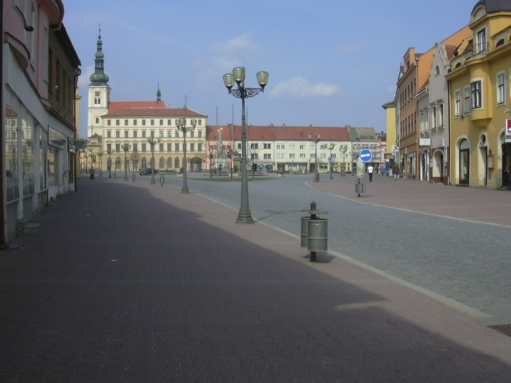 Pohled na náměstí Vyškov